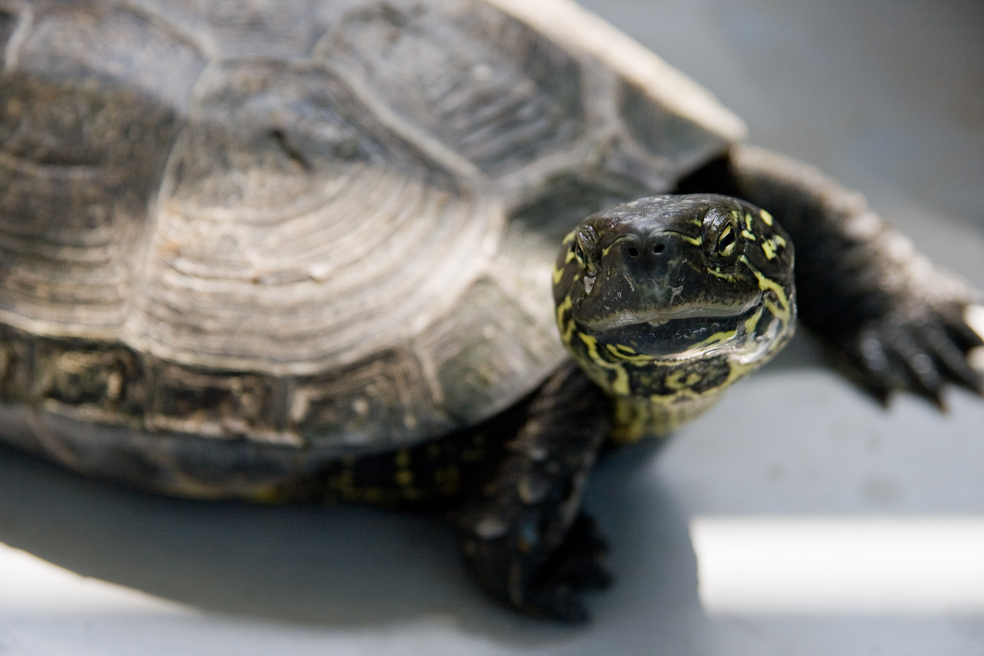 クサガメ (学名:Chinemys reevesii)